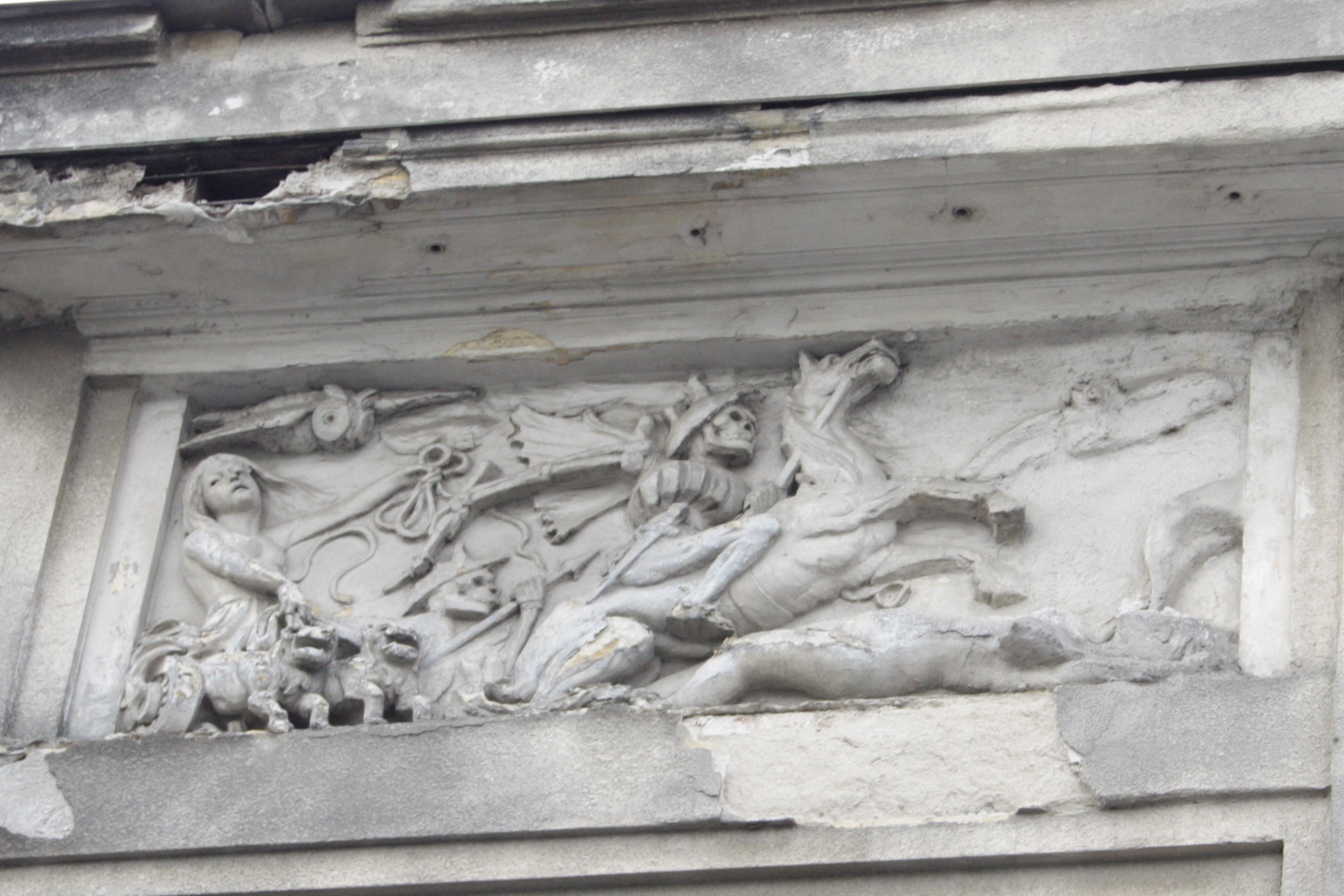 Cinematograful Marconi, Calea Griviței 137 sector 1